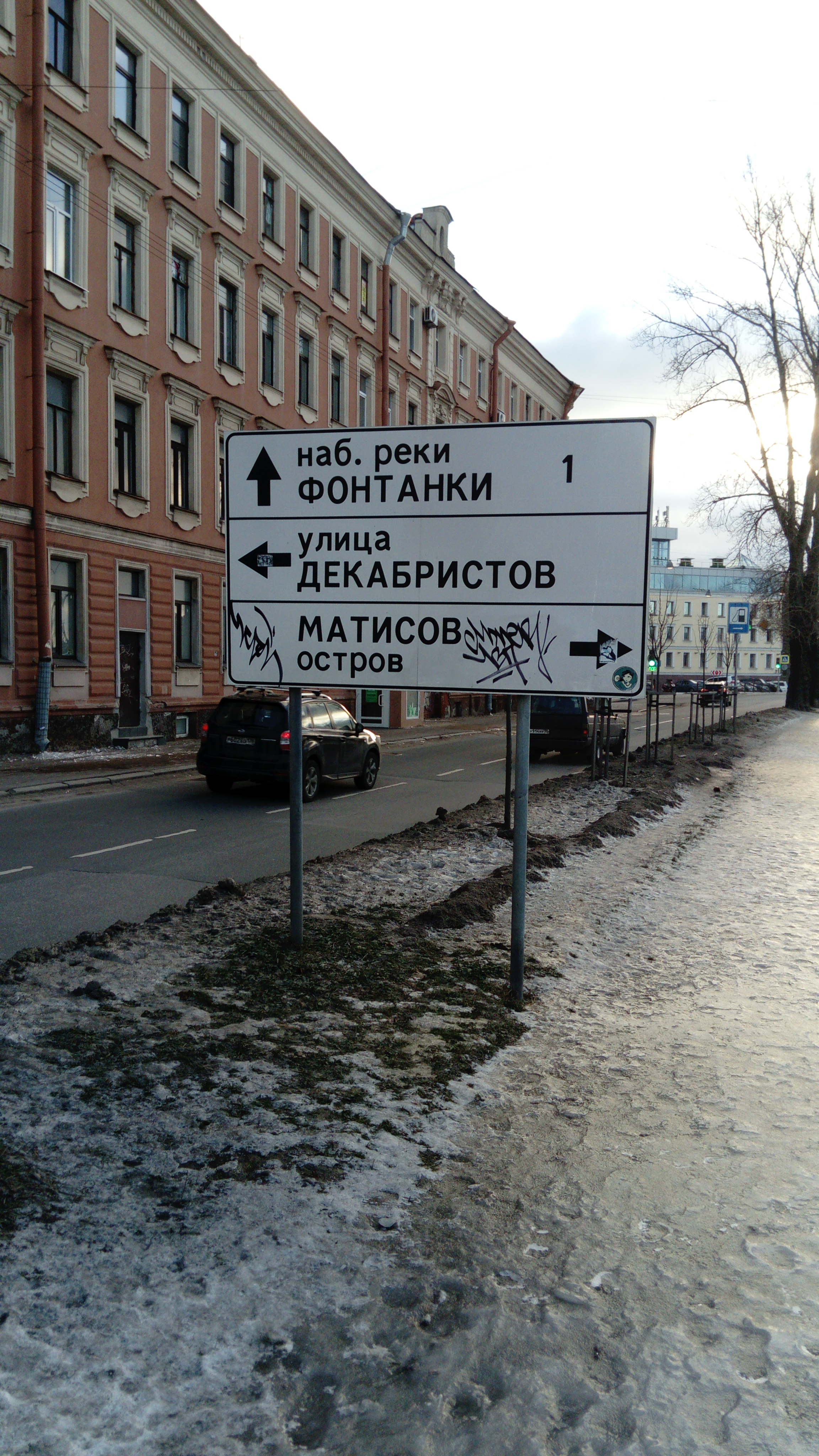 табличка на набережной реки Пряжки вблизи Банного моста с указанием Матисова острова, улицы Декабристов и набережной реки Фонтанки